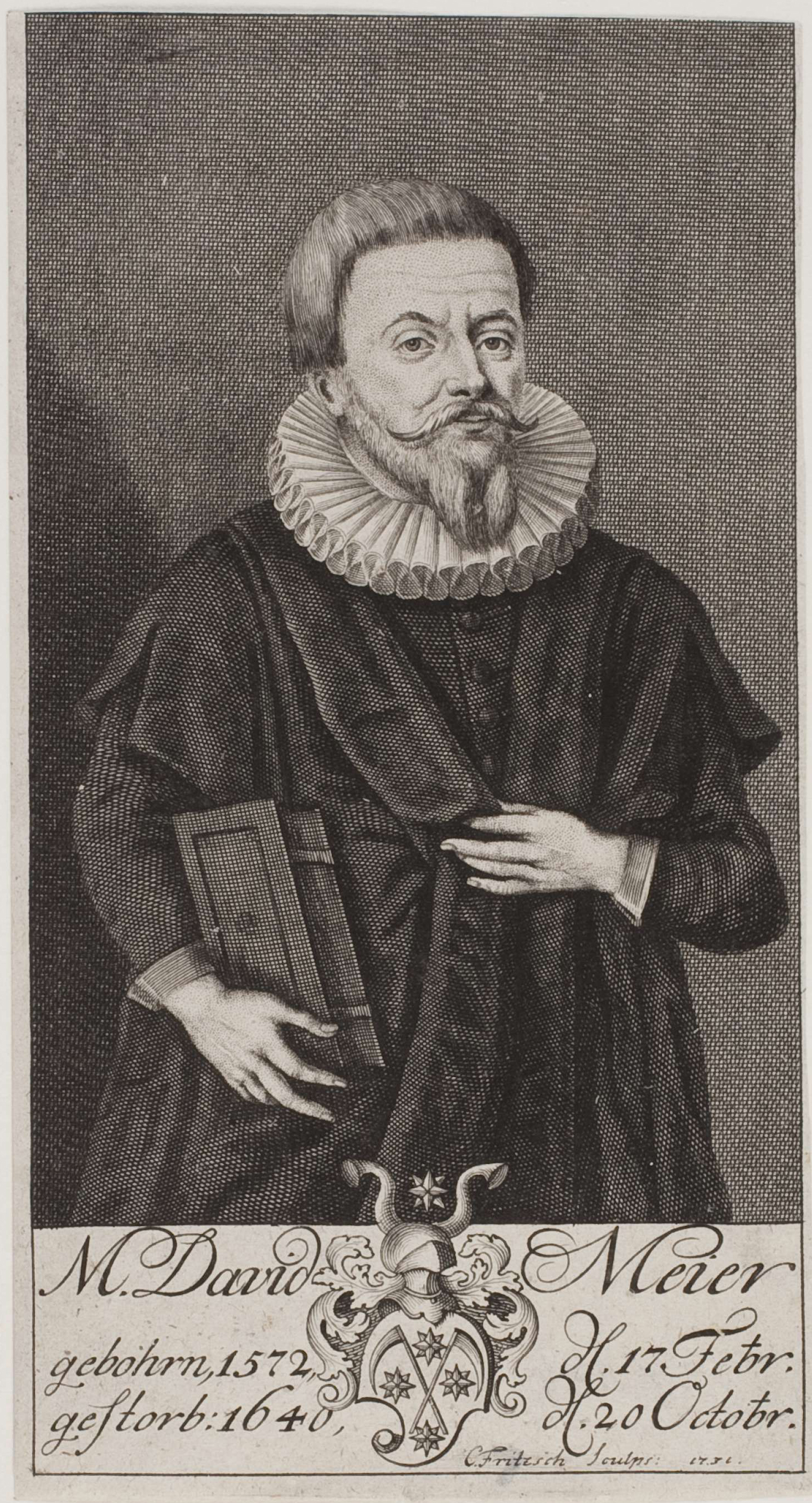 Bildnis des Theologen, Magisters, Seniors des geistlichen Stadtministeriums, Dichter, Chronisten der Stadt Hannover, Gründers der Kreuzkirchen-Bibliothek und Stifters der bis heute erhaltenen Glocke „Großer David“ „M. [:de:David Meier (Theologe)“ – David Meier] gebohrn, 1572, H 17. Febr. gestorb: 1740, H. 20. Octobr. Im Zentrum der Bildunterschrift findet sich das Wappen des Pastors der Marktkirche Hannovers. Das Blatt erschien bei dem hannoverschen Hofbuchhändler Nicolaus Förster und seinem Sohn Johann Jacob Förster.